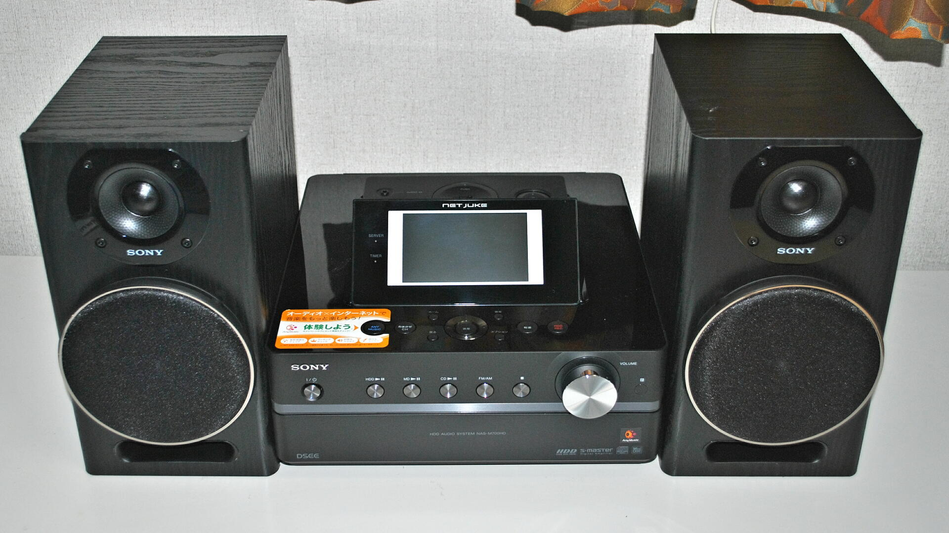 SONY_NAS-M700HD